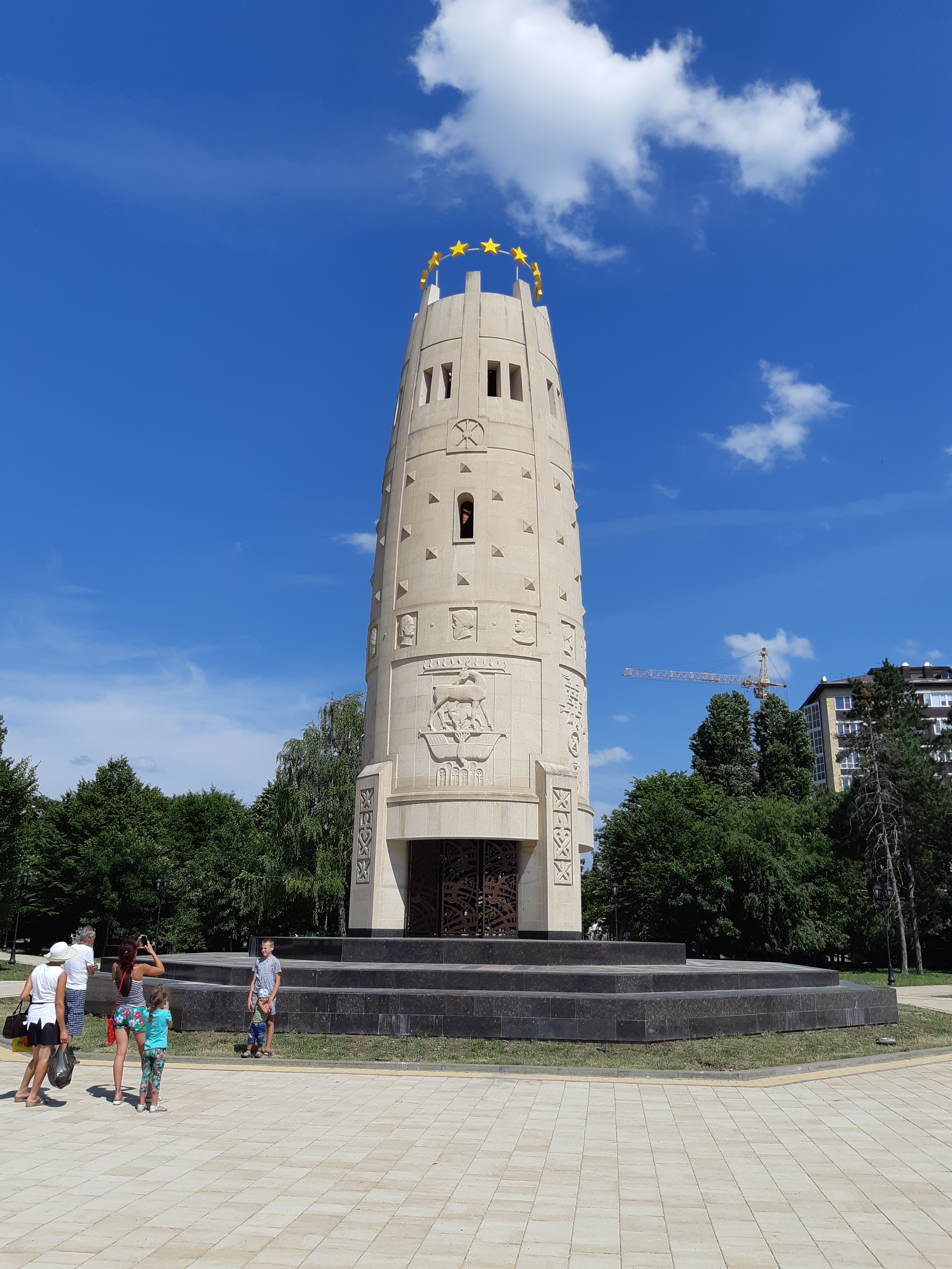 «Монумент Памяти и Единения»: Майкоп, Адыгея